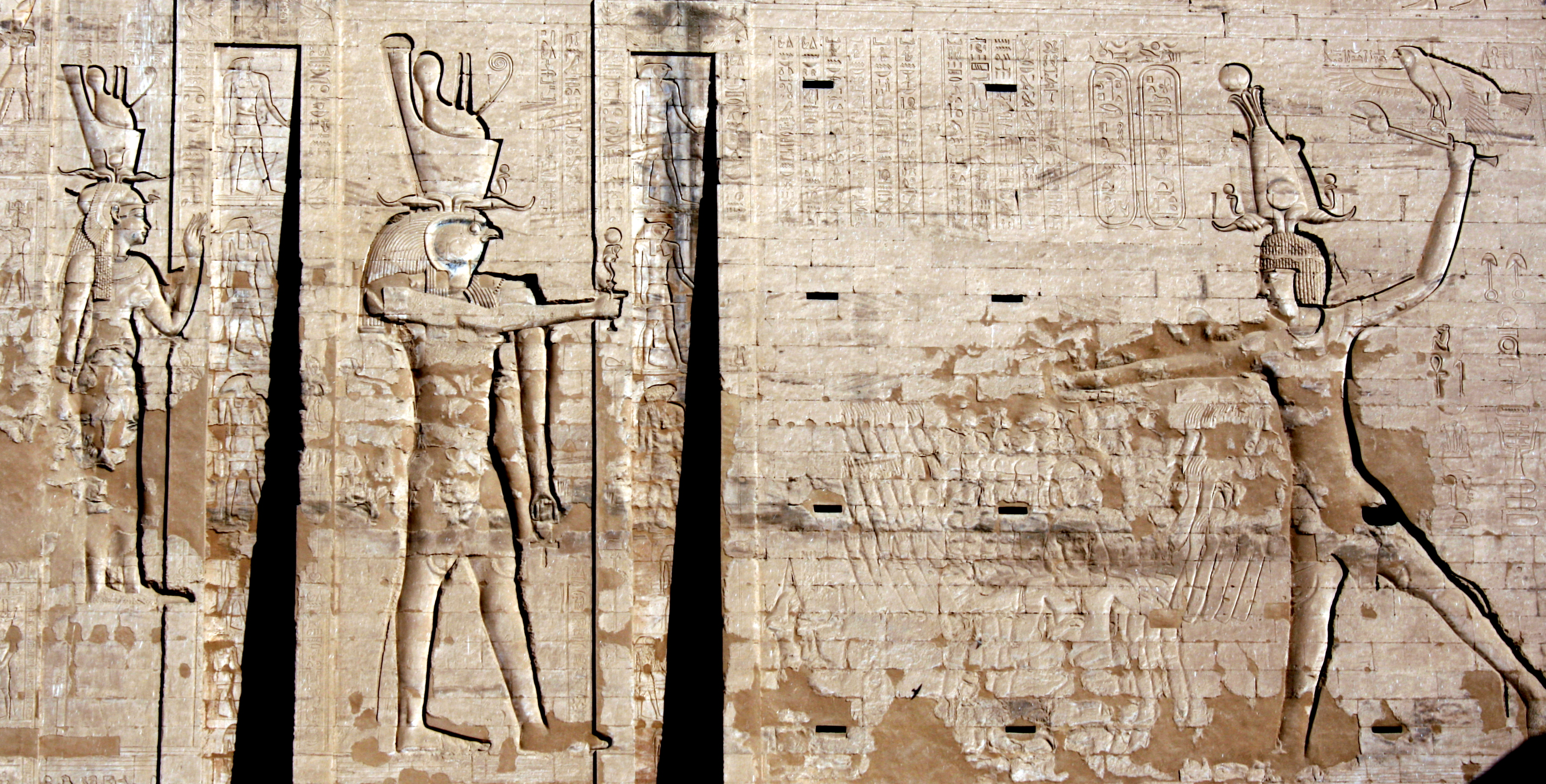 Edfu_Tempel, Wandrelief